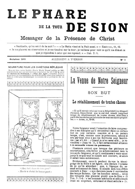 Couverture du premier numéro en français de la revue Le Phare de la tour de Sion (devenue ensuite La Tour de Garde)